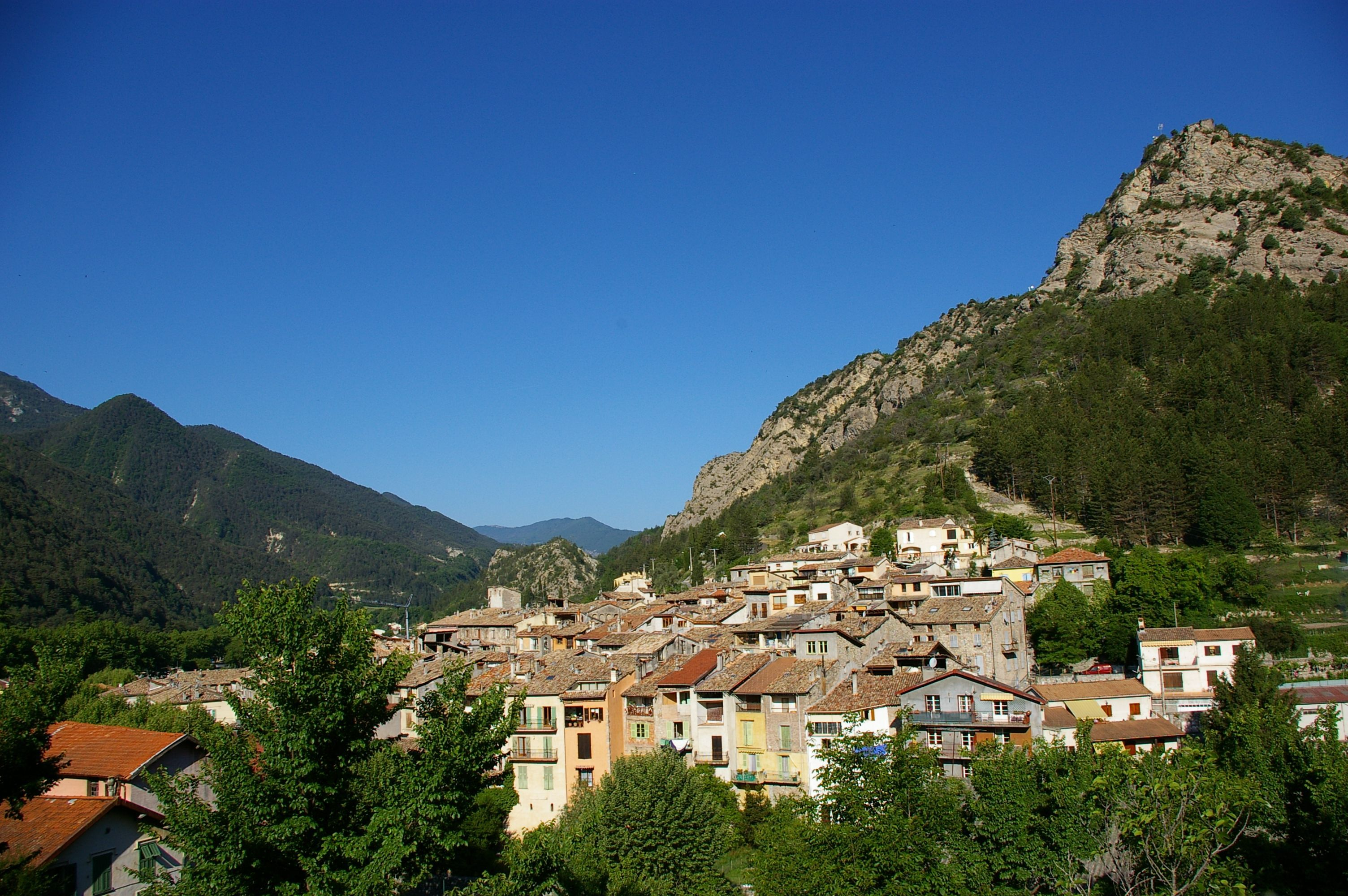 En empruntant la route de la Vallée de la Roudoule, vue sur le village